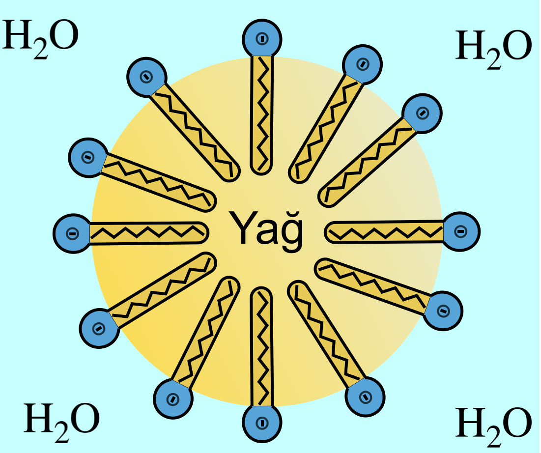 Yüzeyi aktif madde ve yağ kabakası bir arada